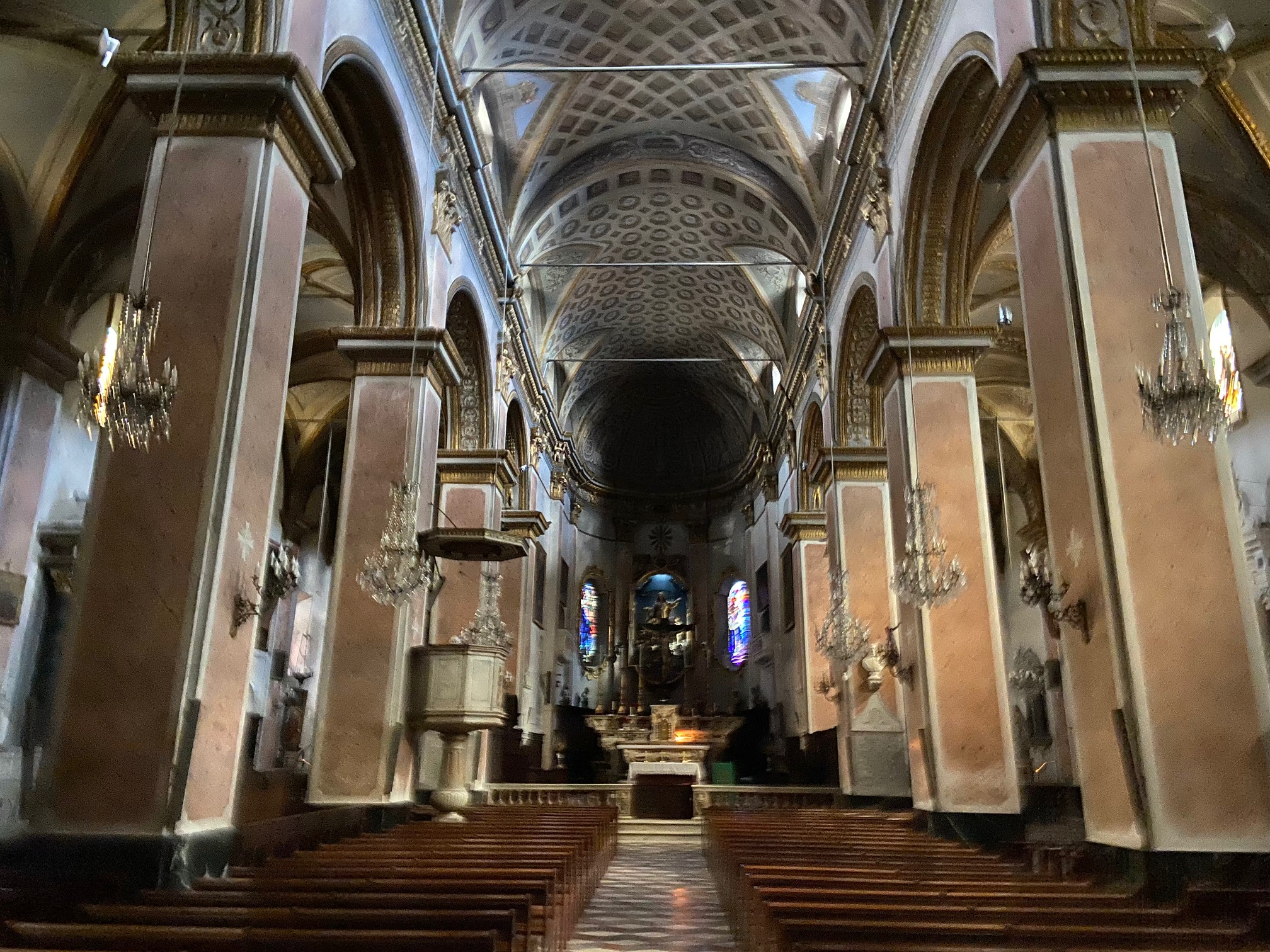 Corsu: A nave di a catedrale Santa Maria Assunta, Bastia, Corsica